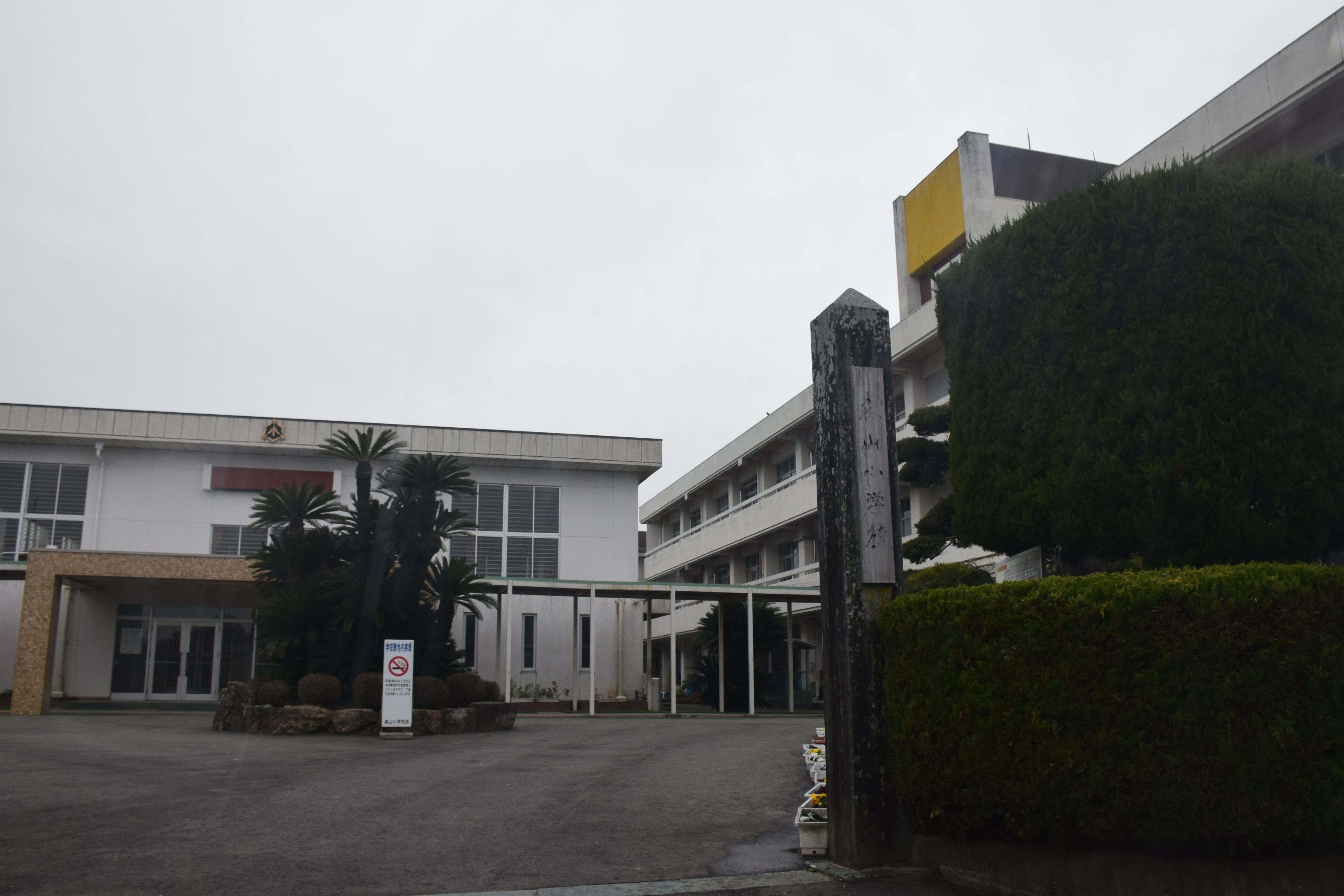 吉野川市立森山小学校